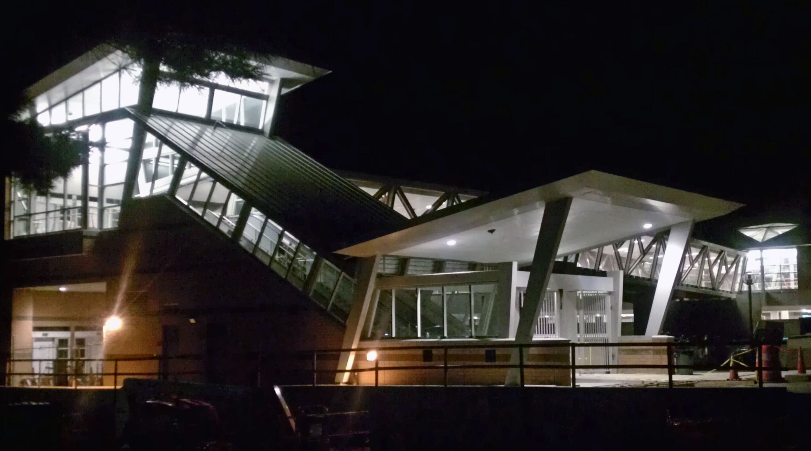 IMAG0679